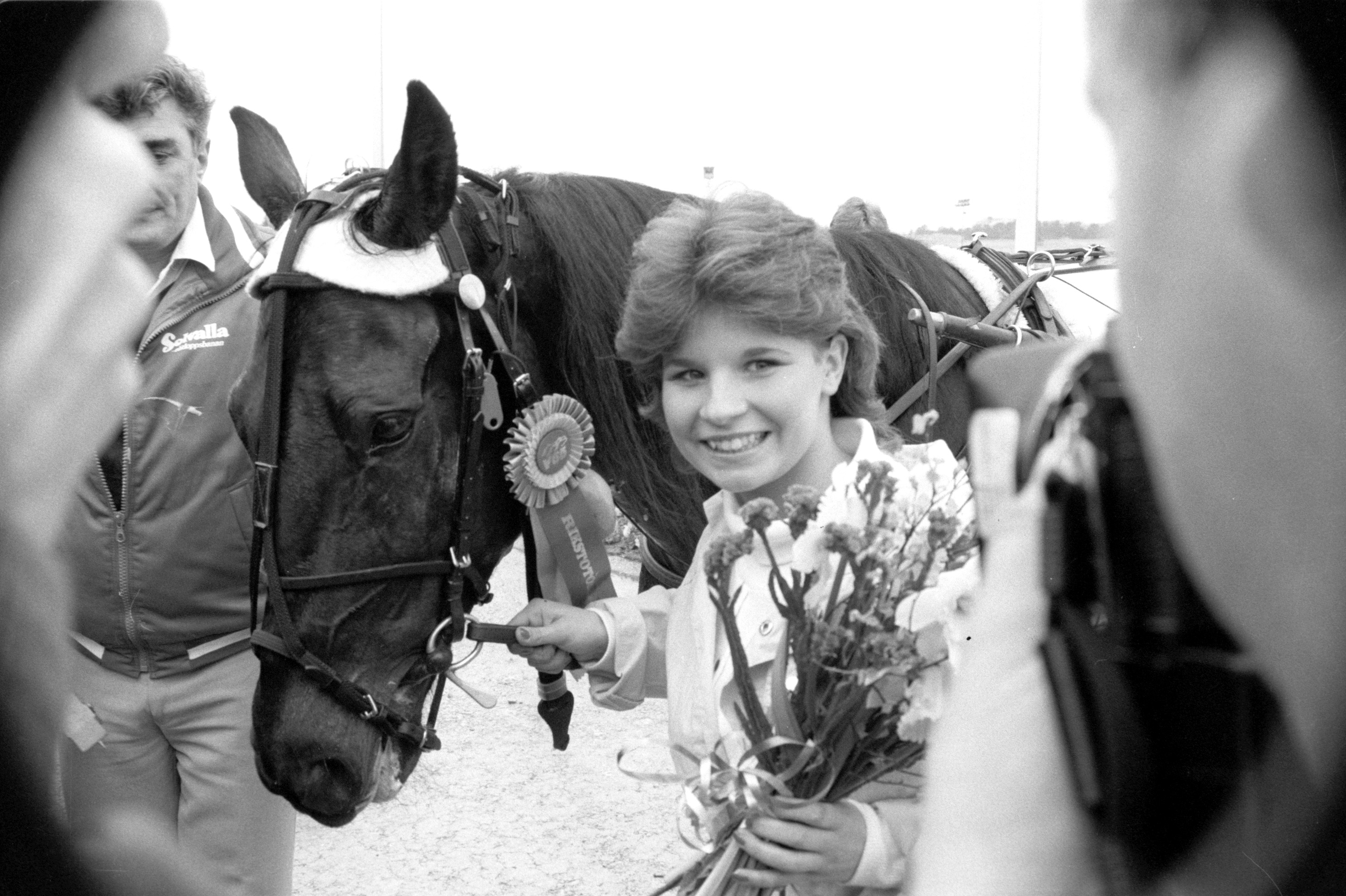 Travaren Legolas och artisten Carola Häggkvist efter segern i FAMN-travet på Solvalla 1983.